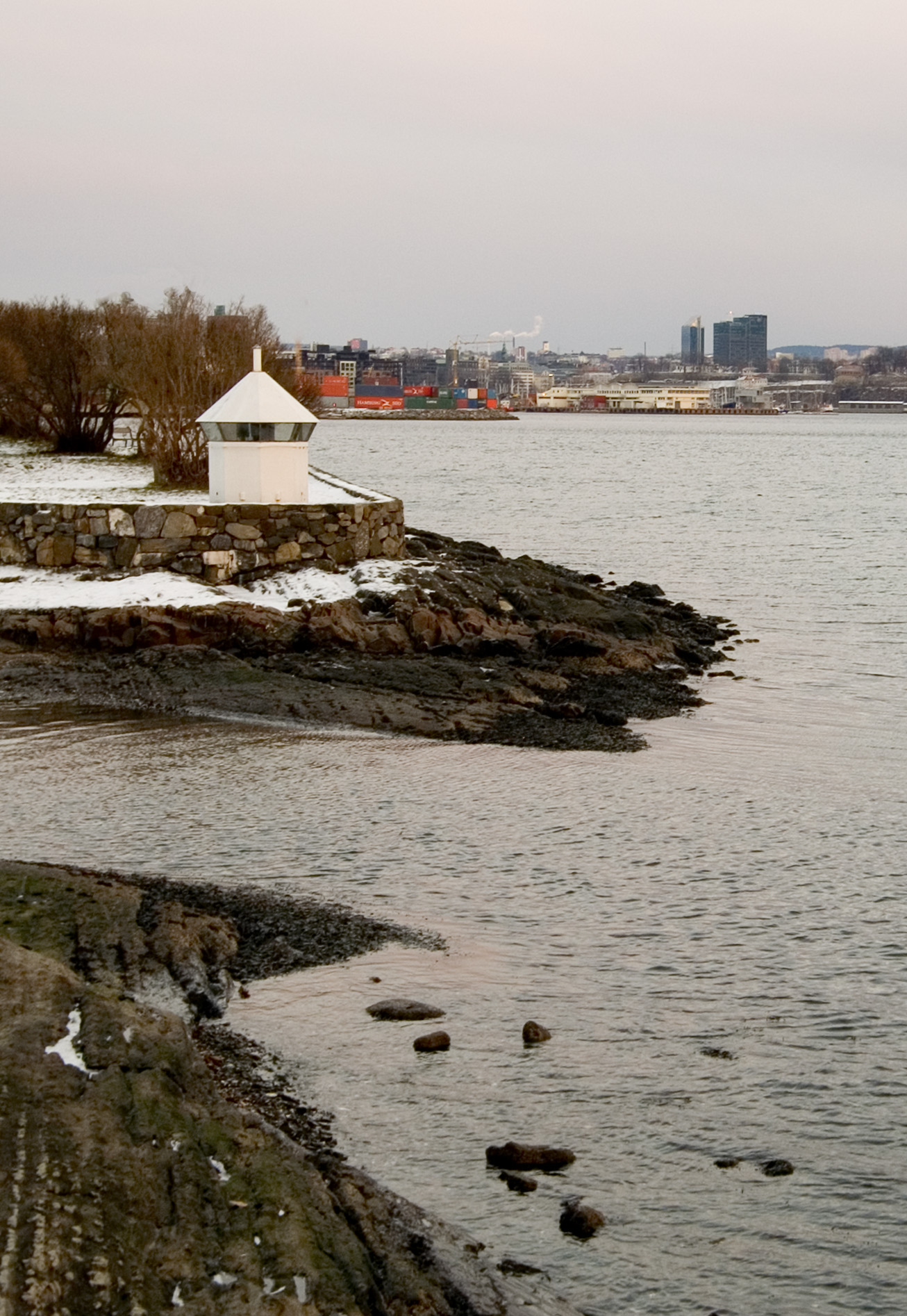 Bygdøy peninsula, Oslo, Norway.